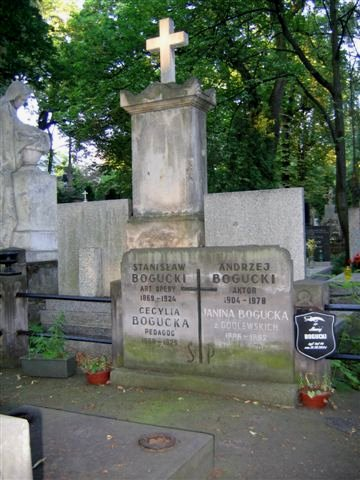 Andrzej Bogucki's monument (Powązki Cemetery, Warsaw, Poland)